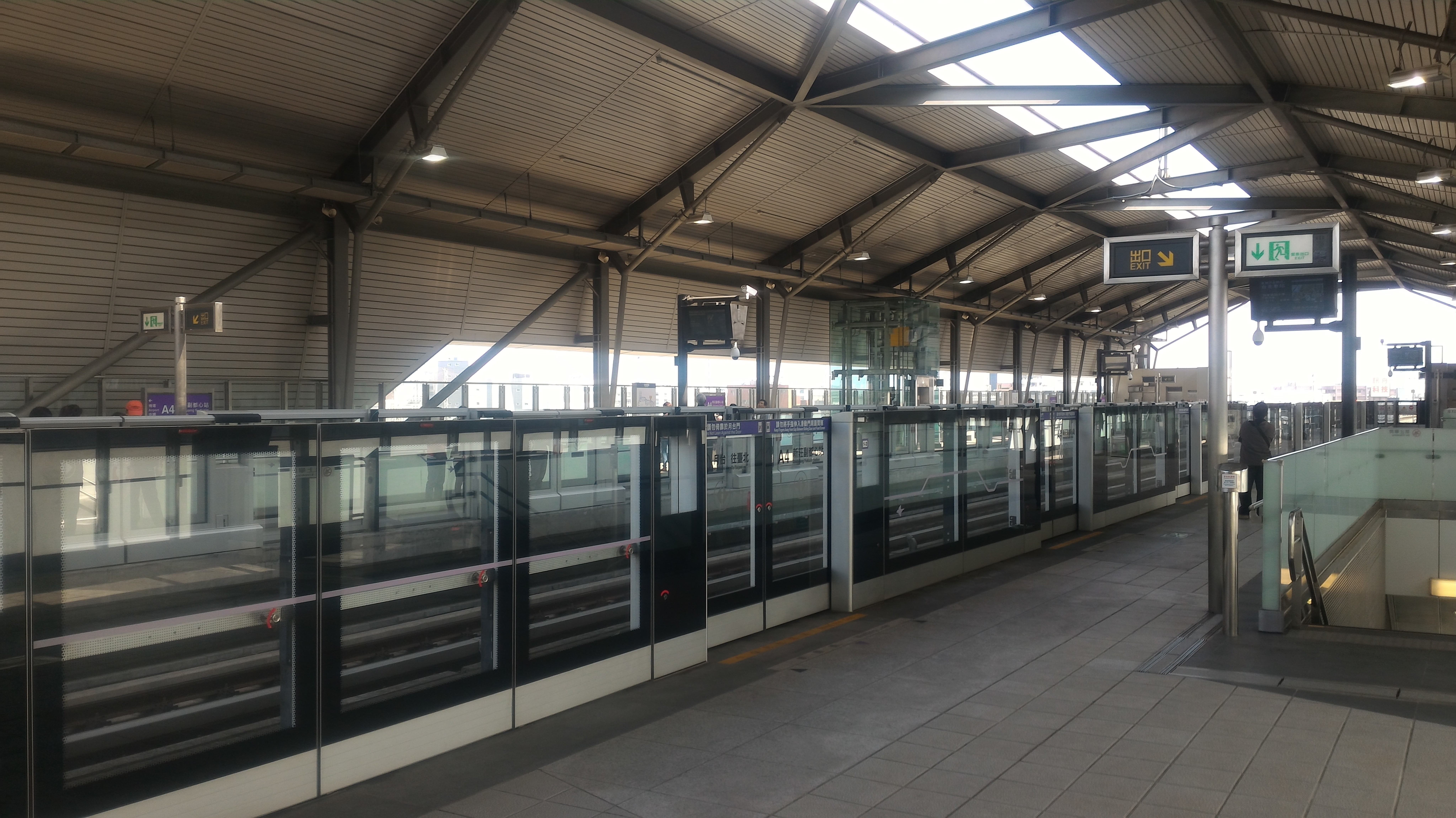 中文（台灣）: 桃園國際機場捷運新莊副都心站月臺層。